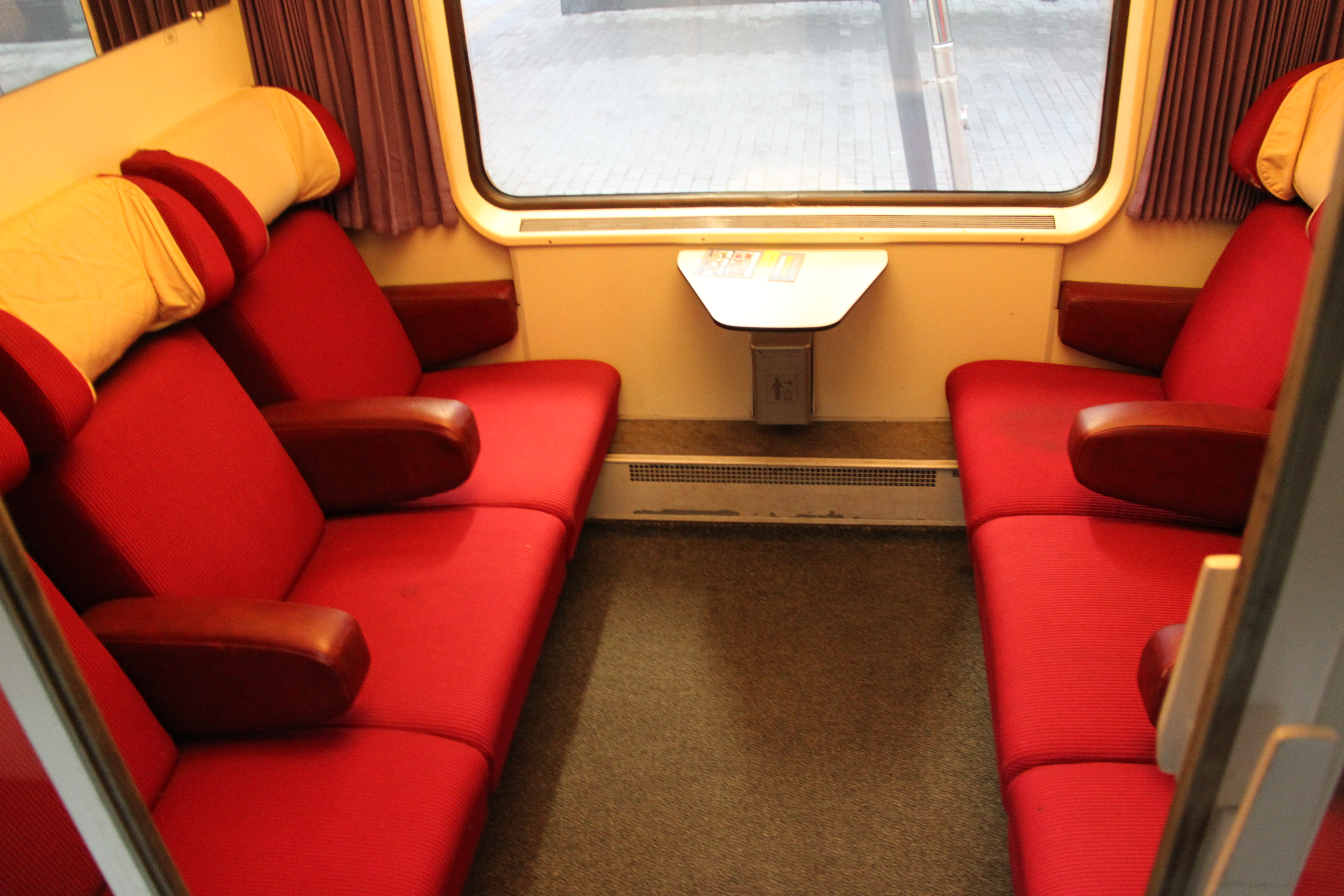 Interieur eerste klasse van een I6-A9 rijtuig